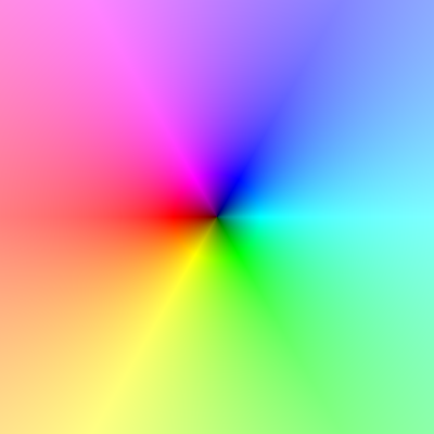 Visible domain: [-5,5] × [-5,5]